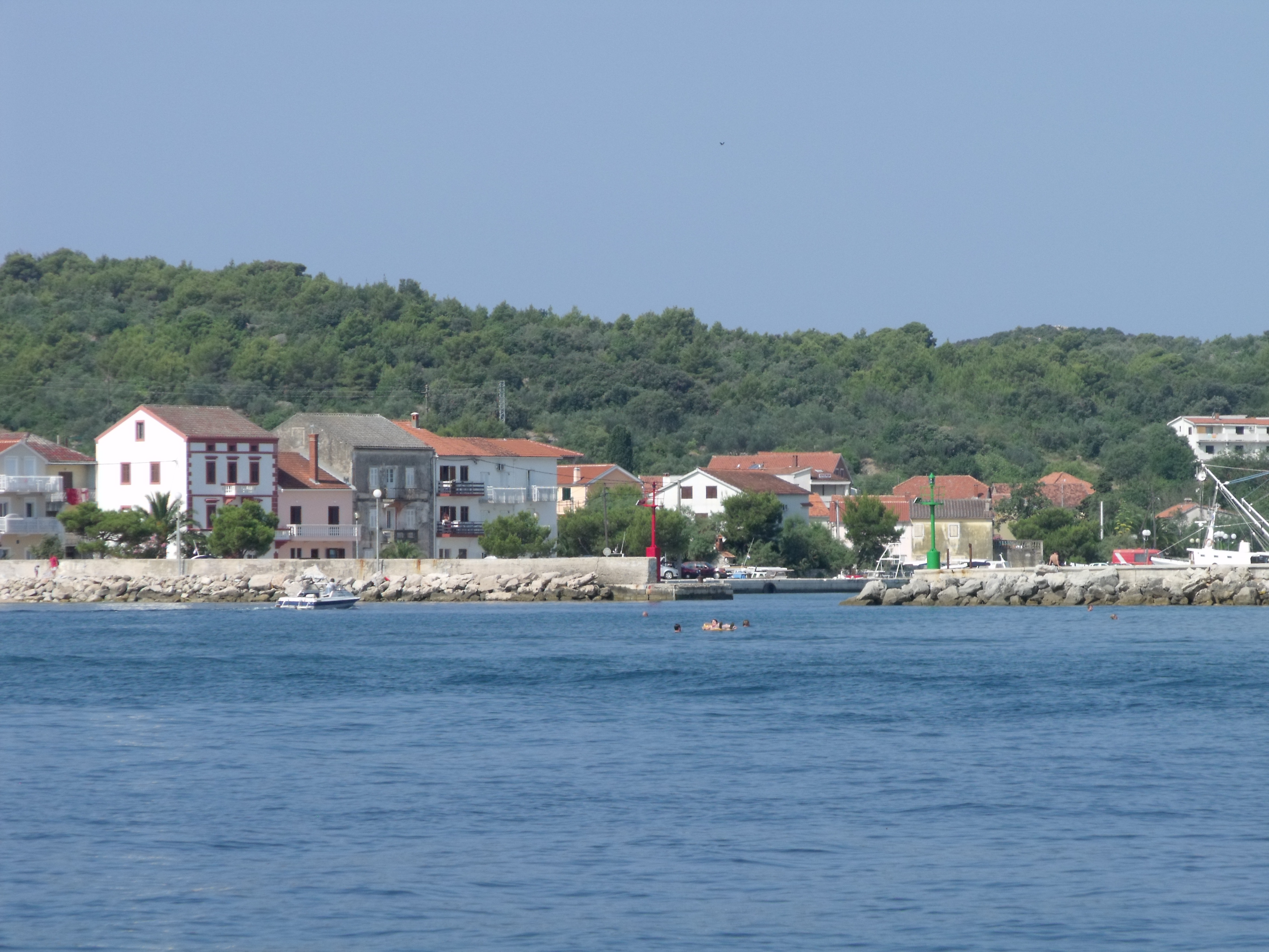 Kukljica